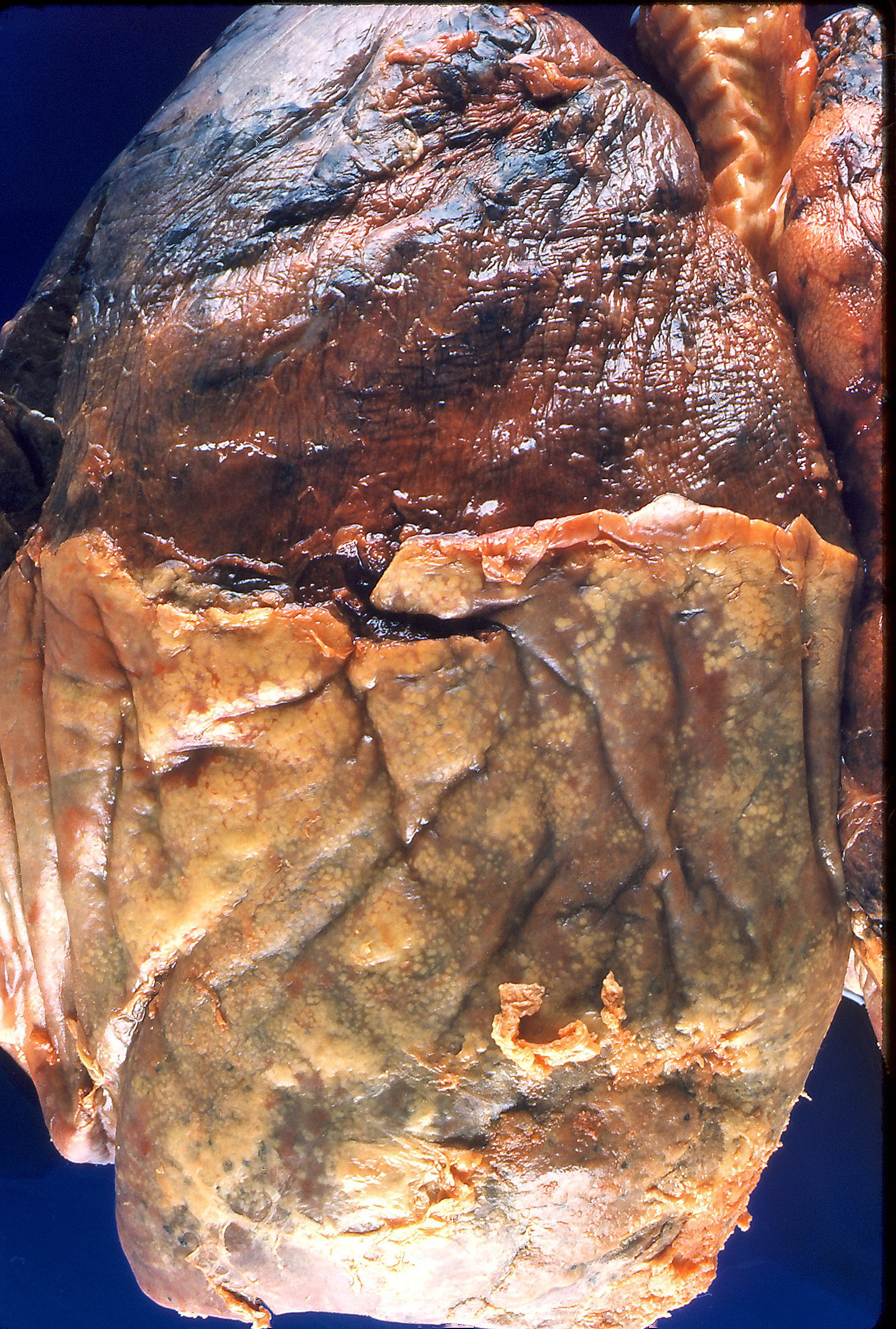 Fibrinous pleuritis overlying subpleural rheumatoid nodules